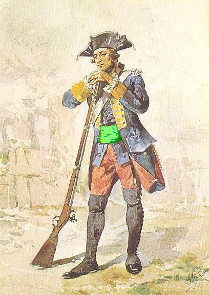 Soldado de infantaria português de 1762